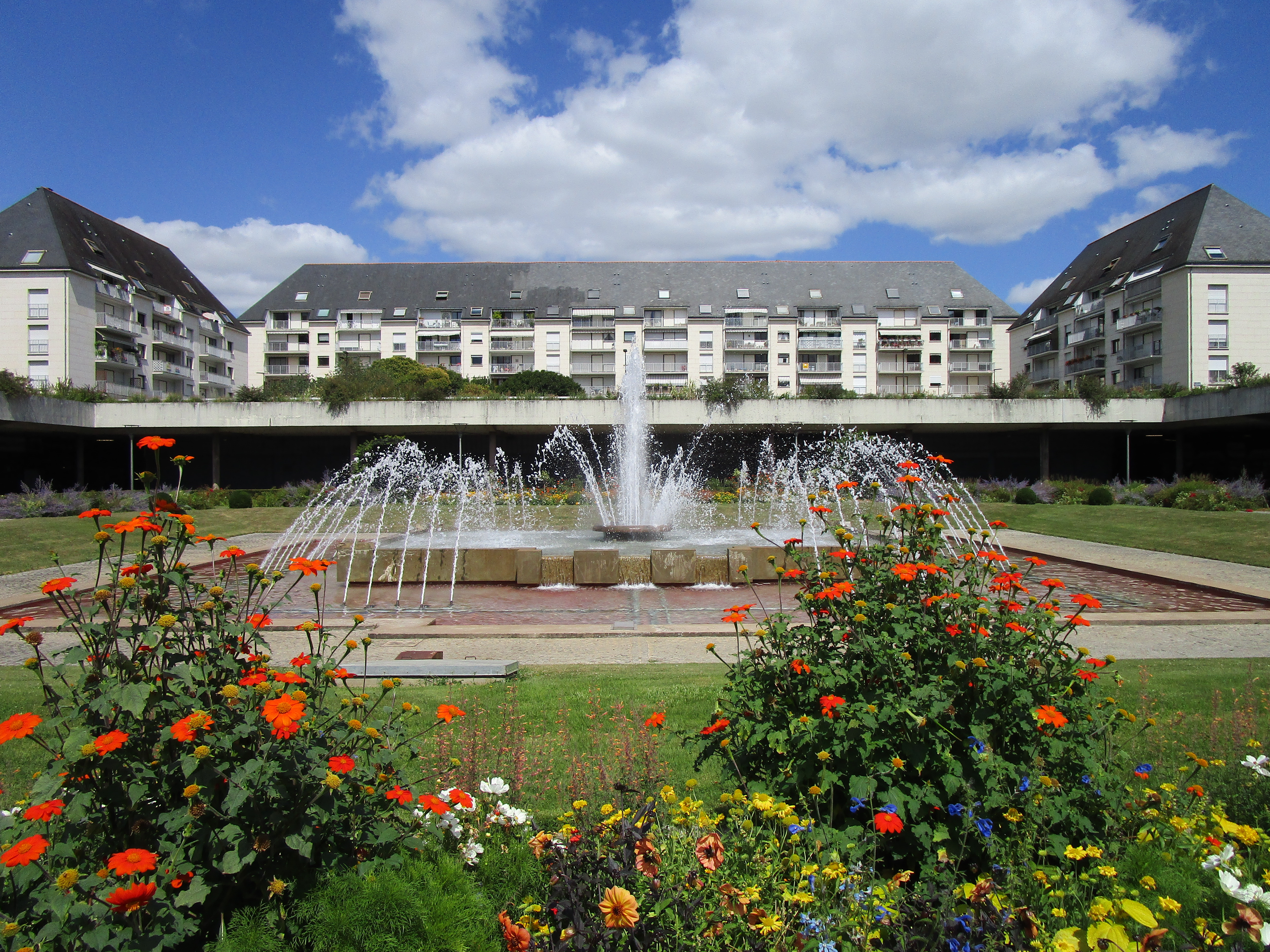 Place de l'amiral Querville, position centrale du quartier des Fontaines à Tours.